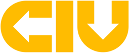 ciu:s logga